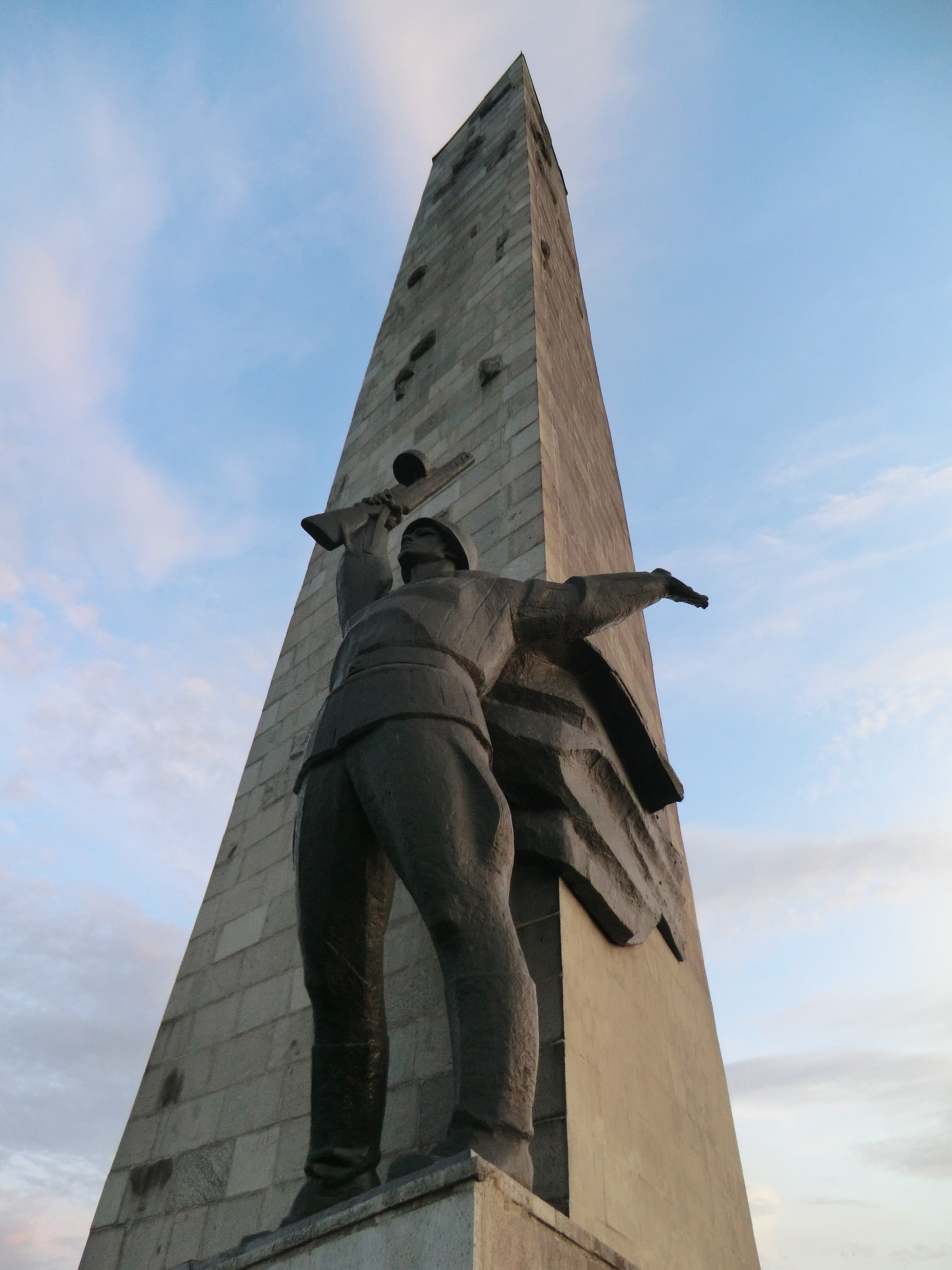 Мемориальный комплекс "Саур-Могила". Главный монумент